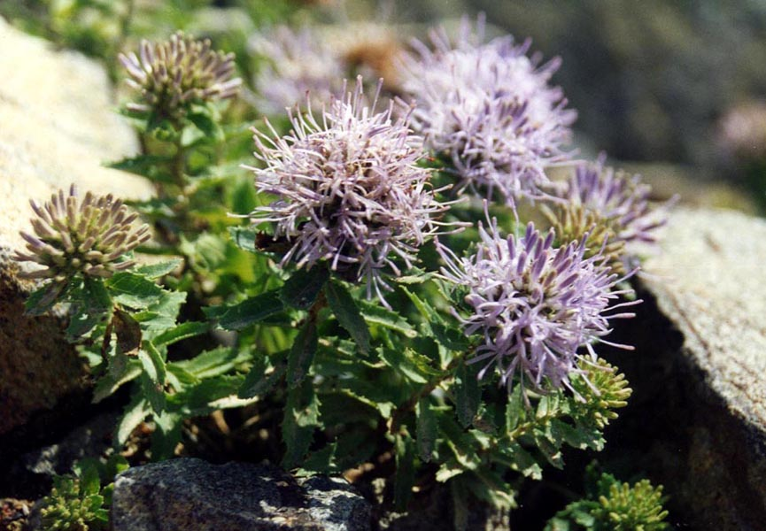 Campanula jacquinii (Syn. Trachelium jacquinii)